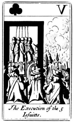 Popish Plot Playcard 8 Die Hinrichtung der 5 Jesuiten